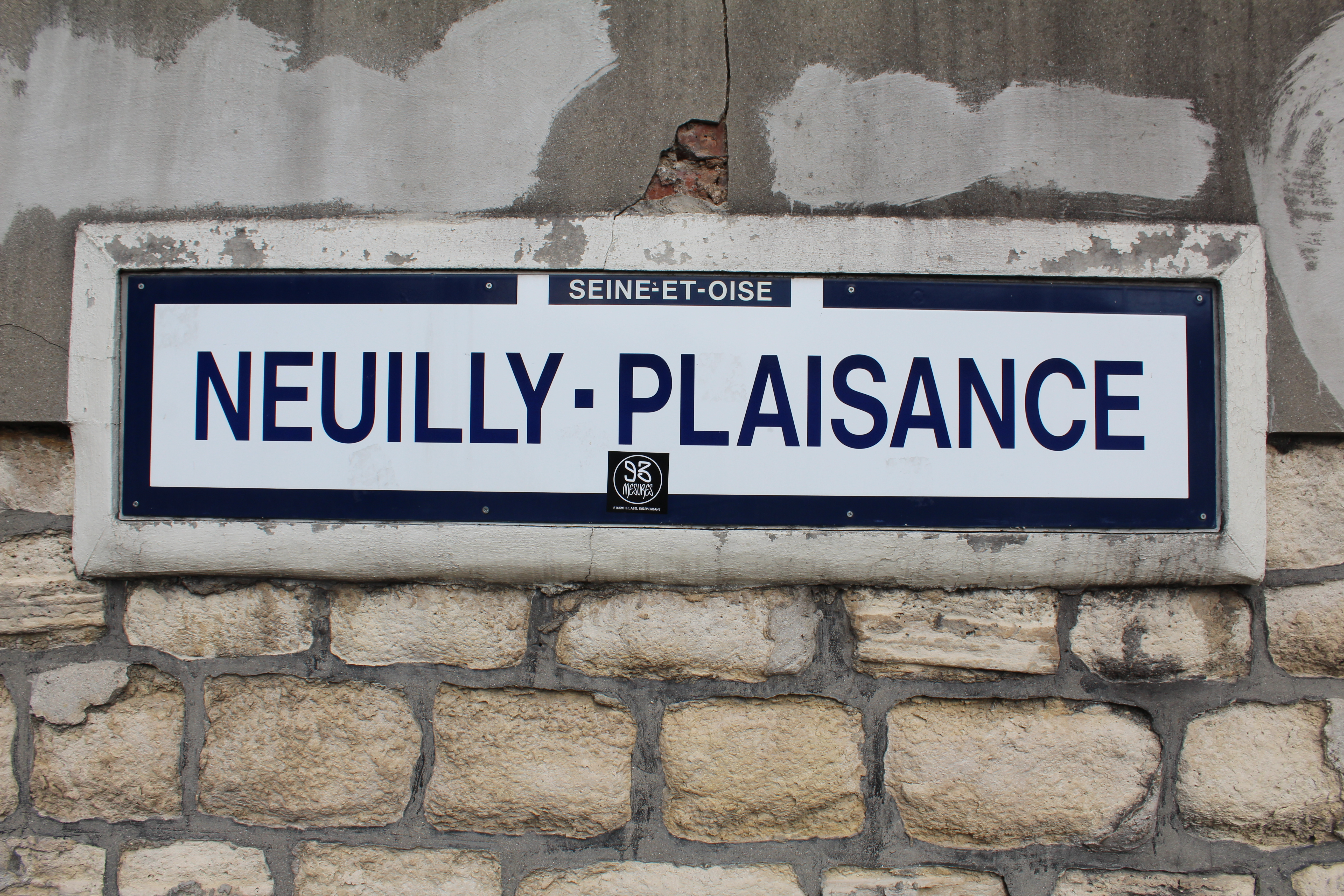 Panneau d'entrée dans Neuilly-Plaisance.